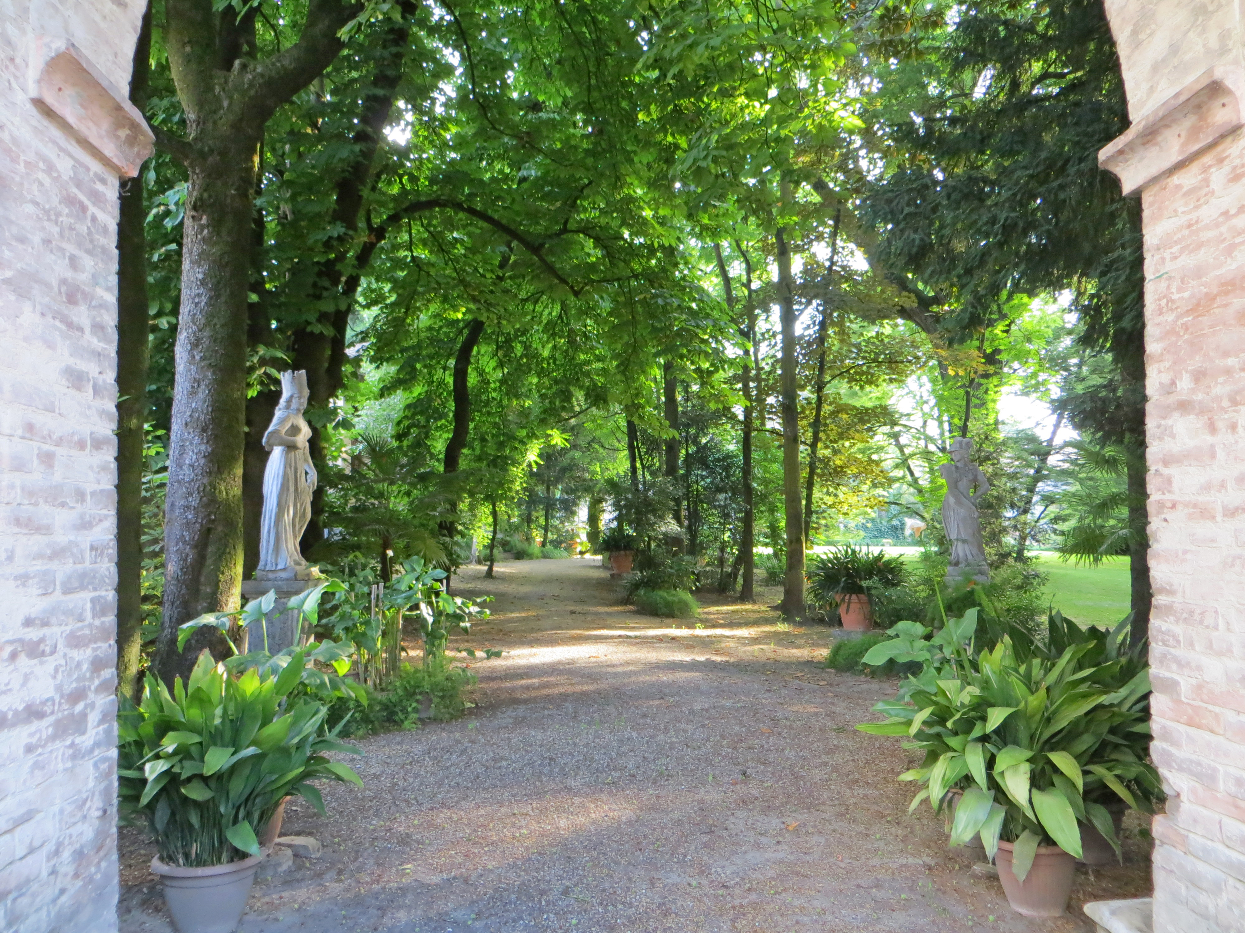 Rocca Meli Lupi (Soragna) - parco